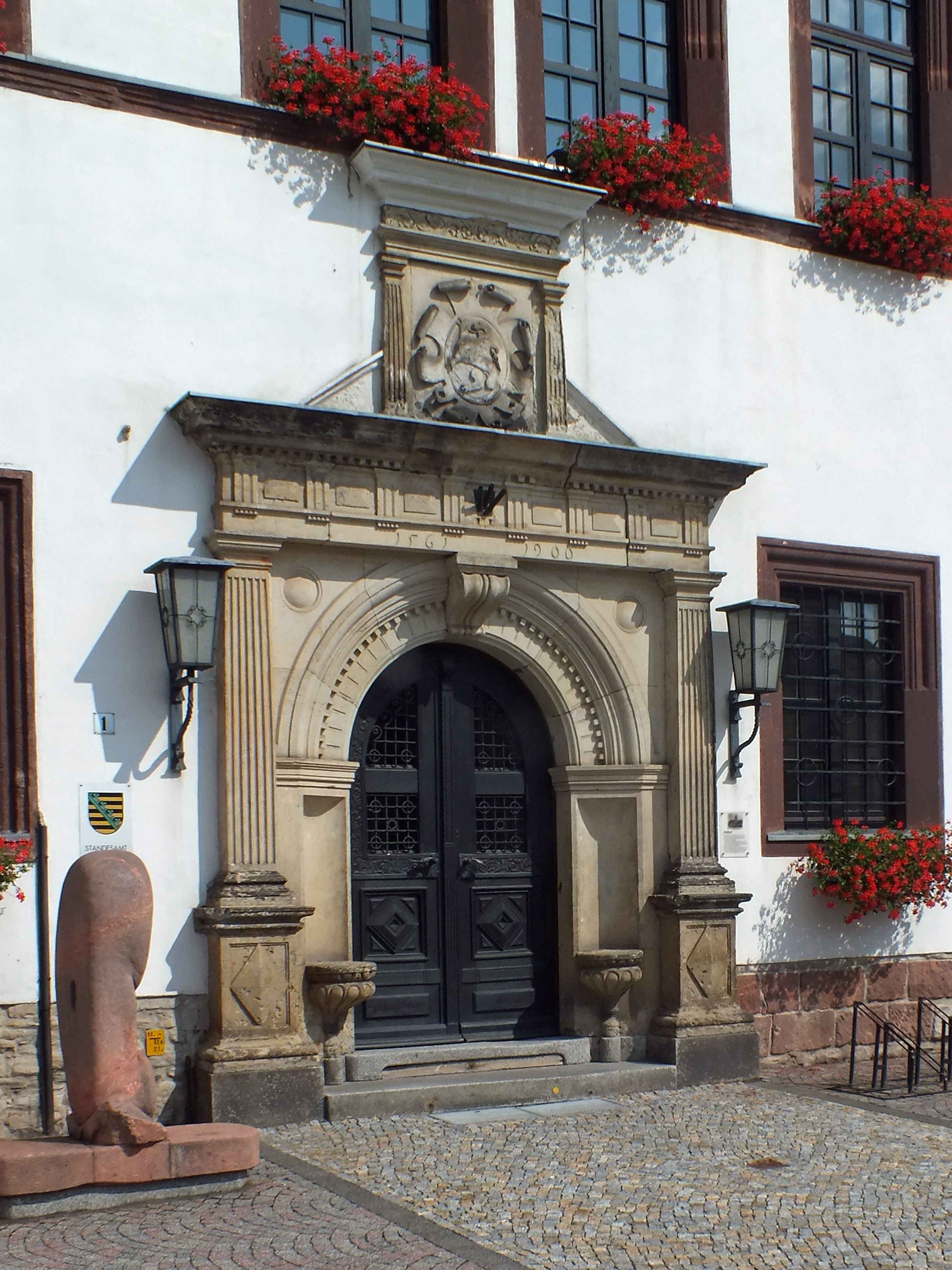 Rathaus Pegau, Sitznischenportal, Haupteingang